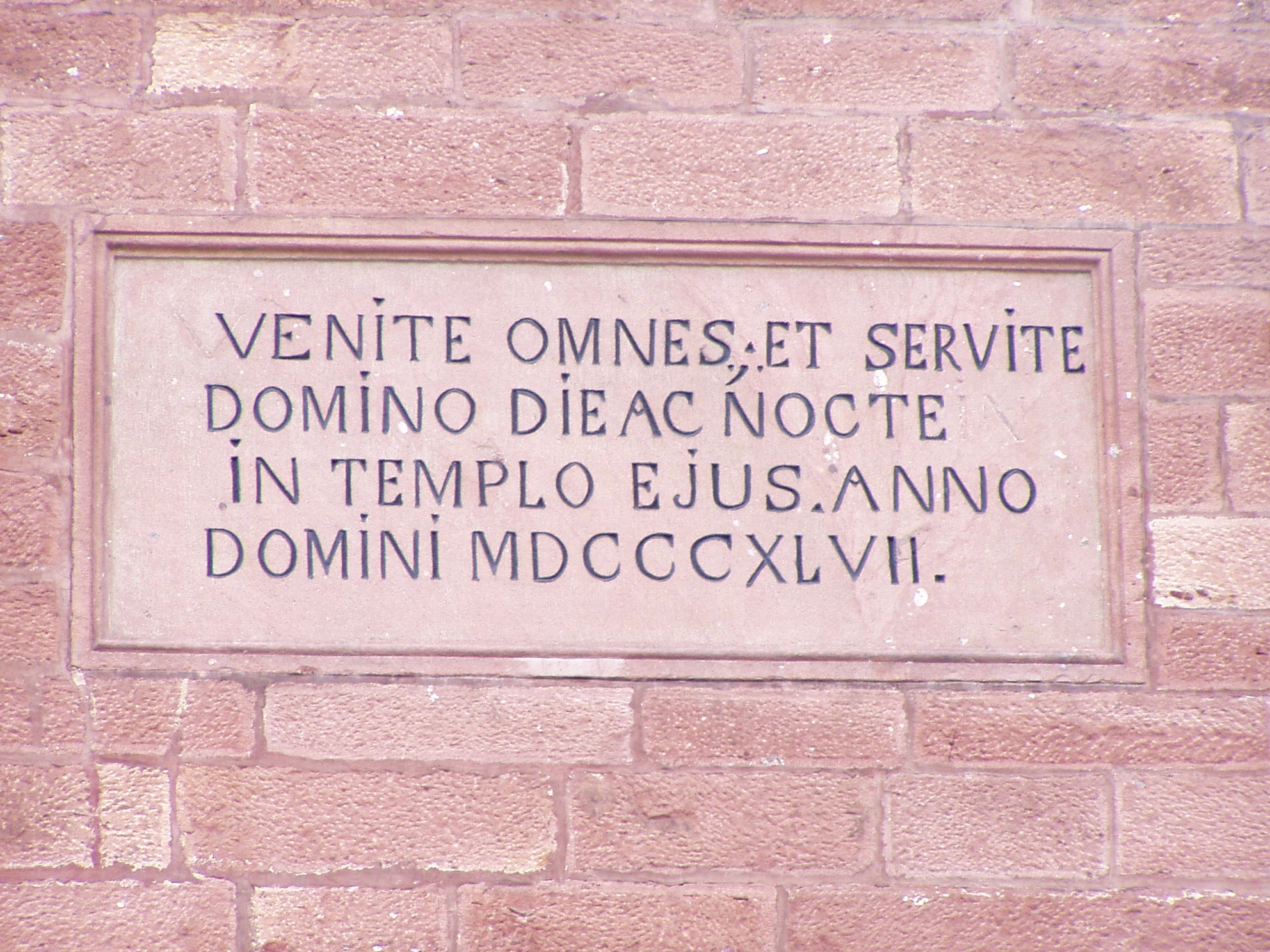 Plaque indiquant la date de construction (1847) de l'église d'Urbès